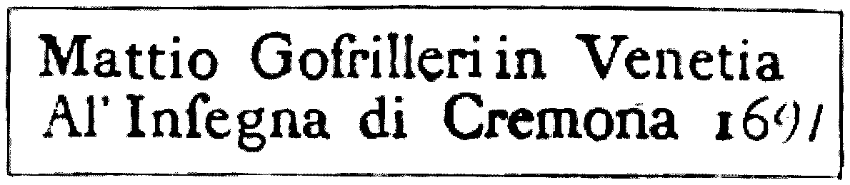 Signature Matteo Goffriller - 1691